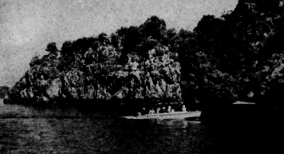 鏡泊湖 徒歩旅行 体位向上